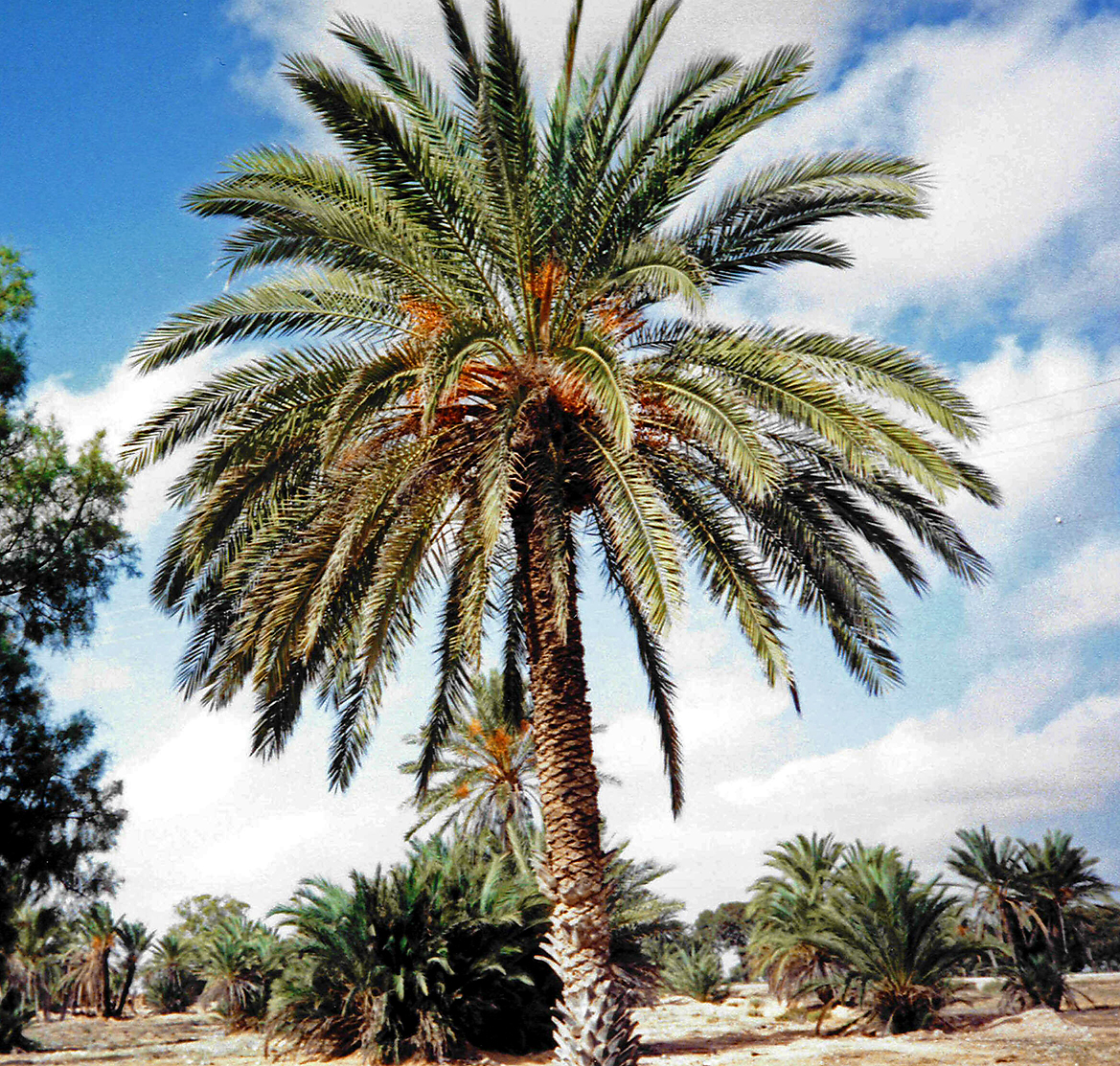 Dattelpalmen auf Djerba mit reifen Früchten